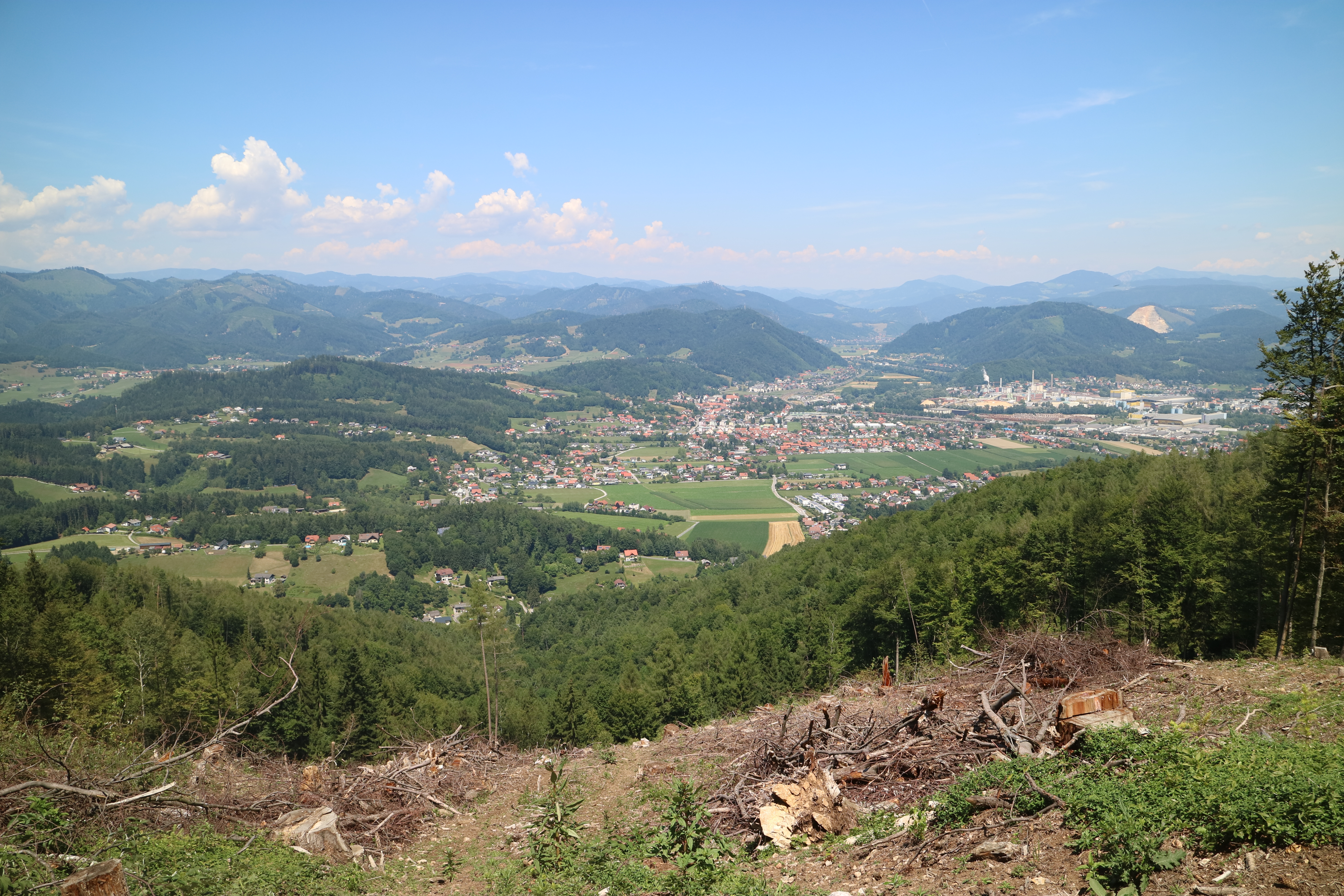 Blick vom Generalkogel ins Gratkorner Becken, Marktgemeinde Gratwein-Straßengel (Steiermark)